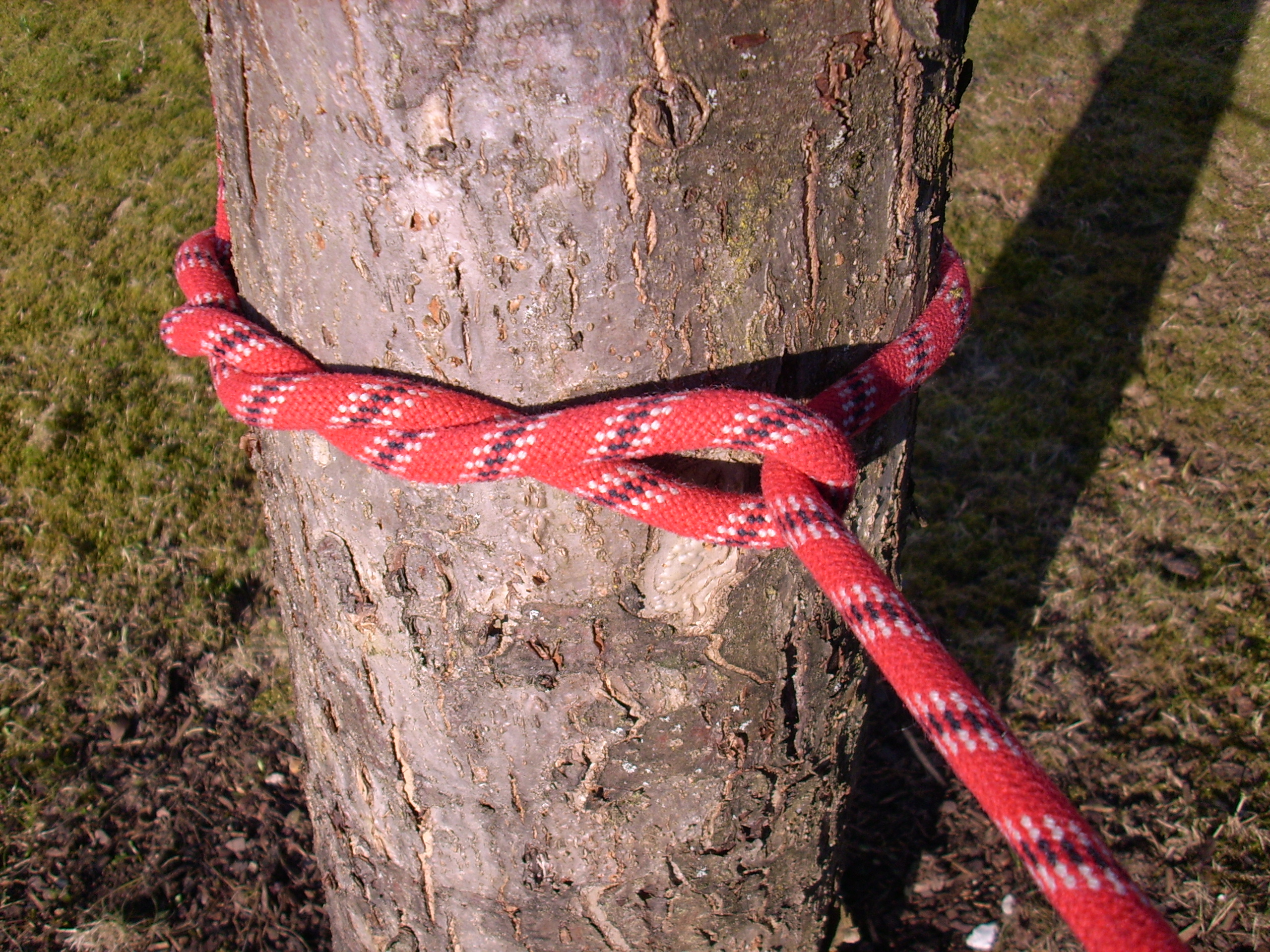 Zimmermannsknoten, zum Befestigen eines Seiles am Baum. Zusammen mit einem halben Schlag als Befestigung von Balken an einem Seil.